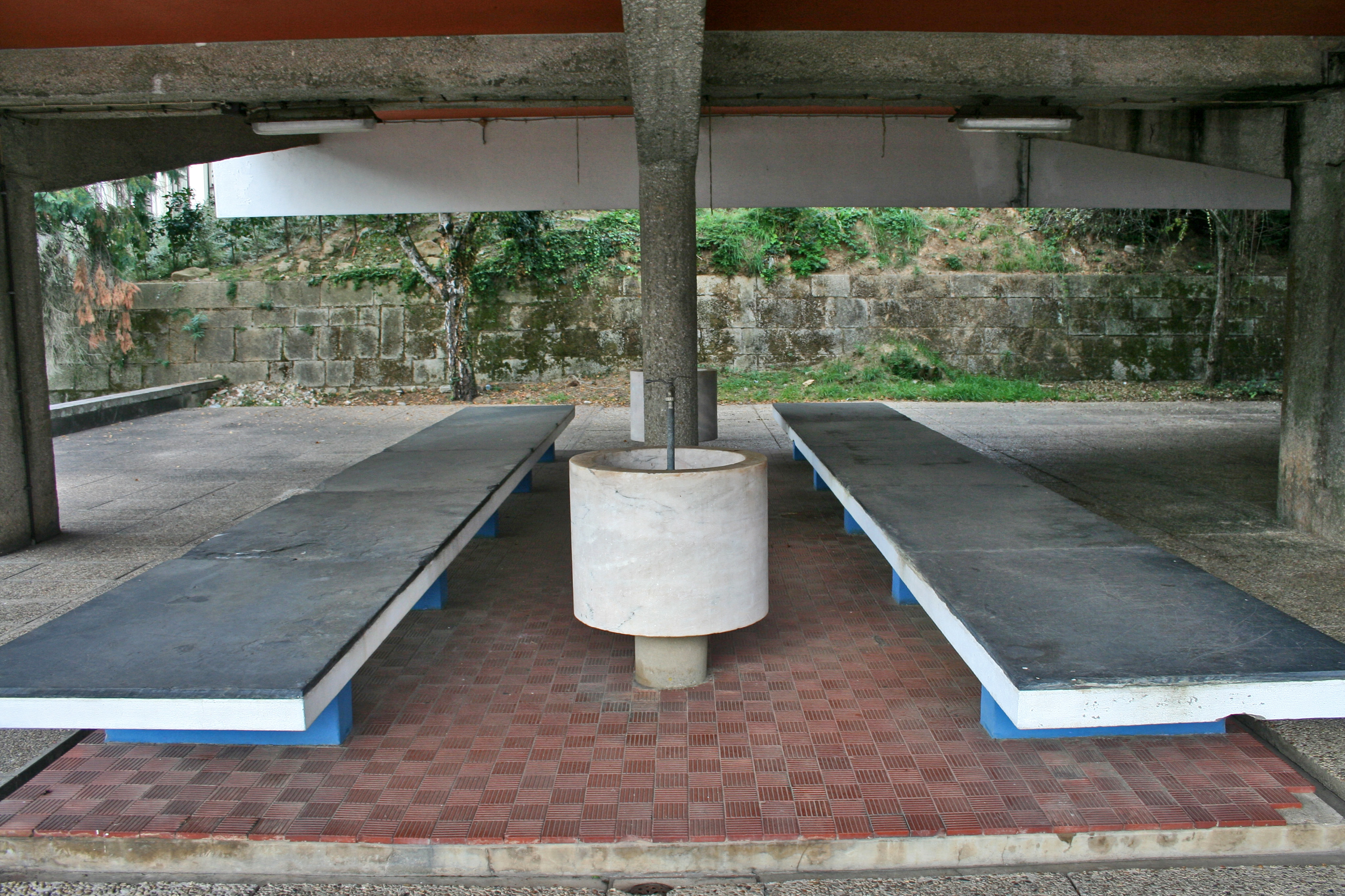 Mercado Municipal de Santa Maria da Feira This file was uploaded for Wiki Loves Monuments in Portugal with the unique identifier 6325648.